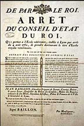 Copie de l'arrêt royal transformant l'école vétérinaire de Lyon en école royale